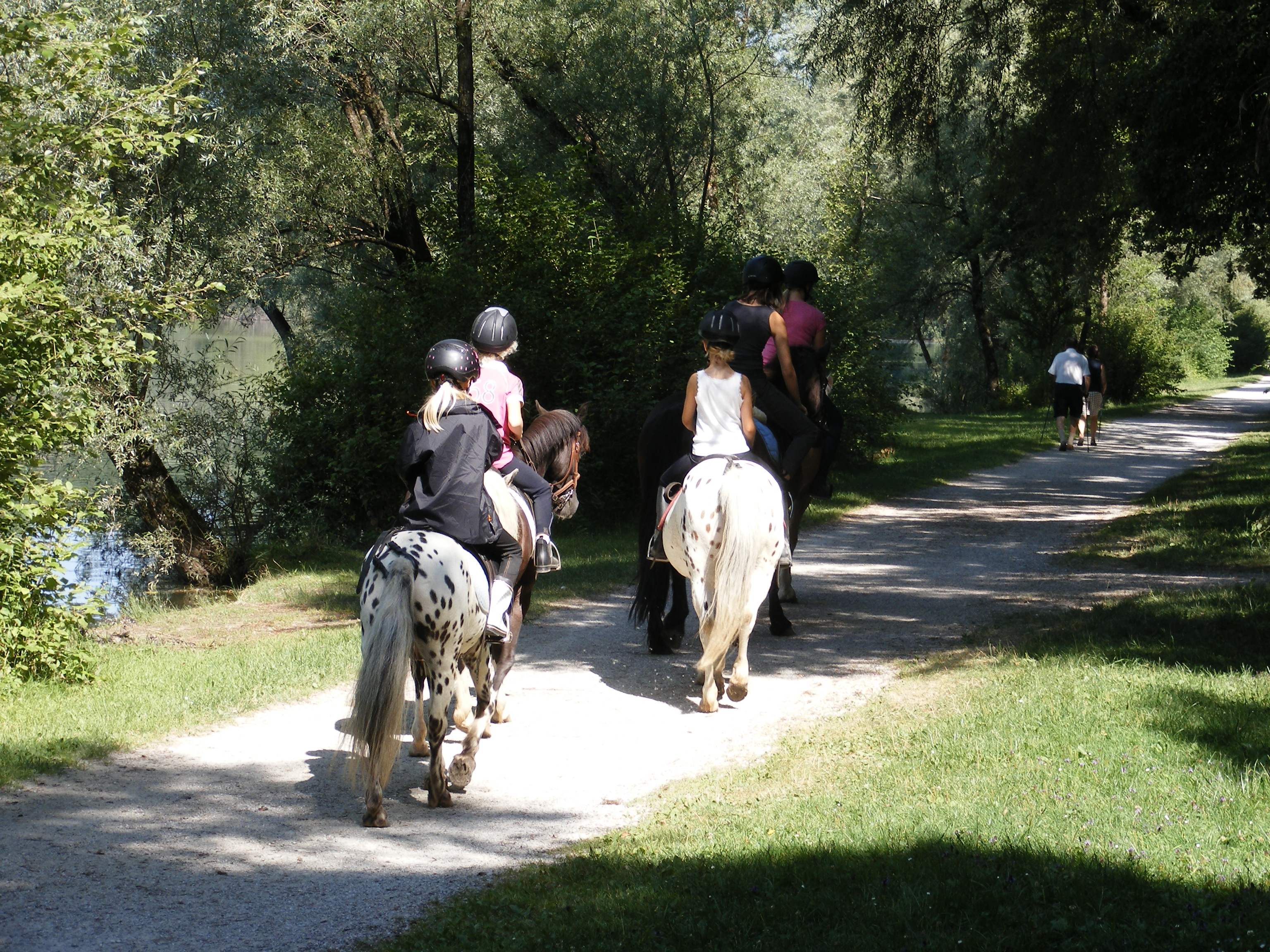 Am Salzachsee im Norden der Stadt Salzburg